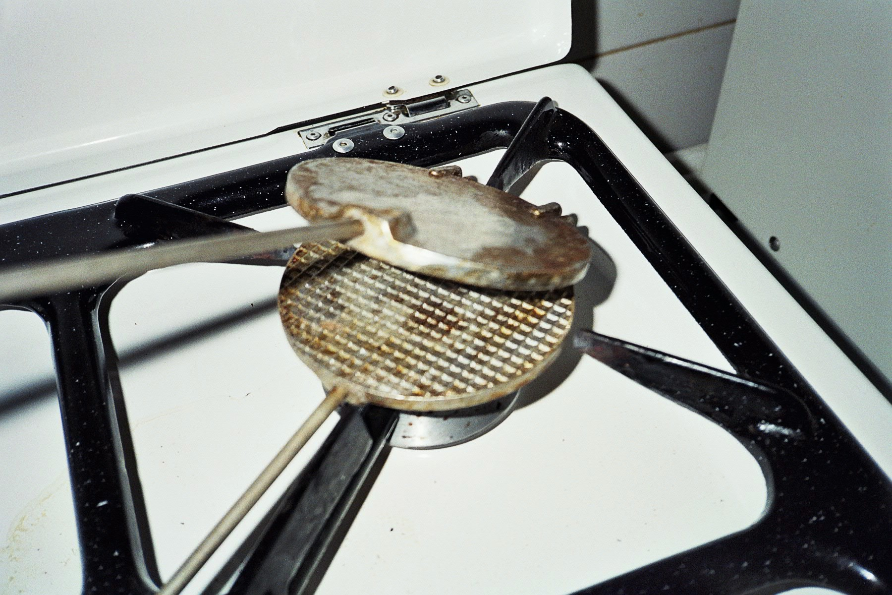 Kniepertjesijzer